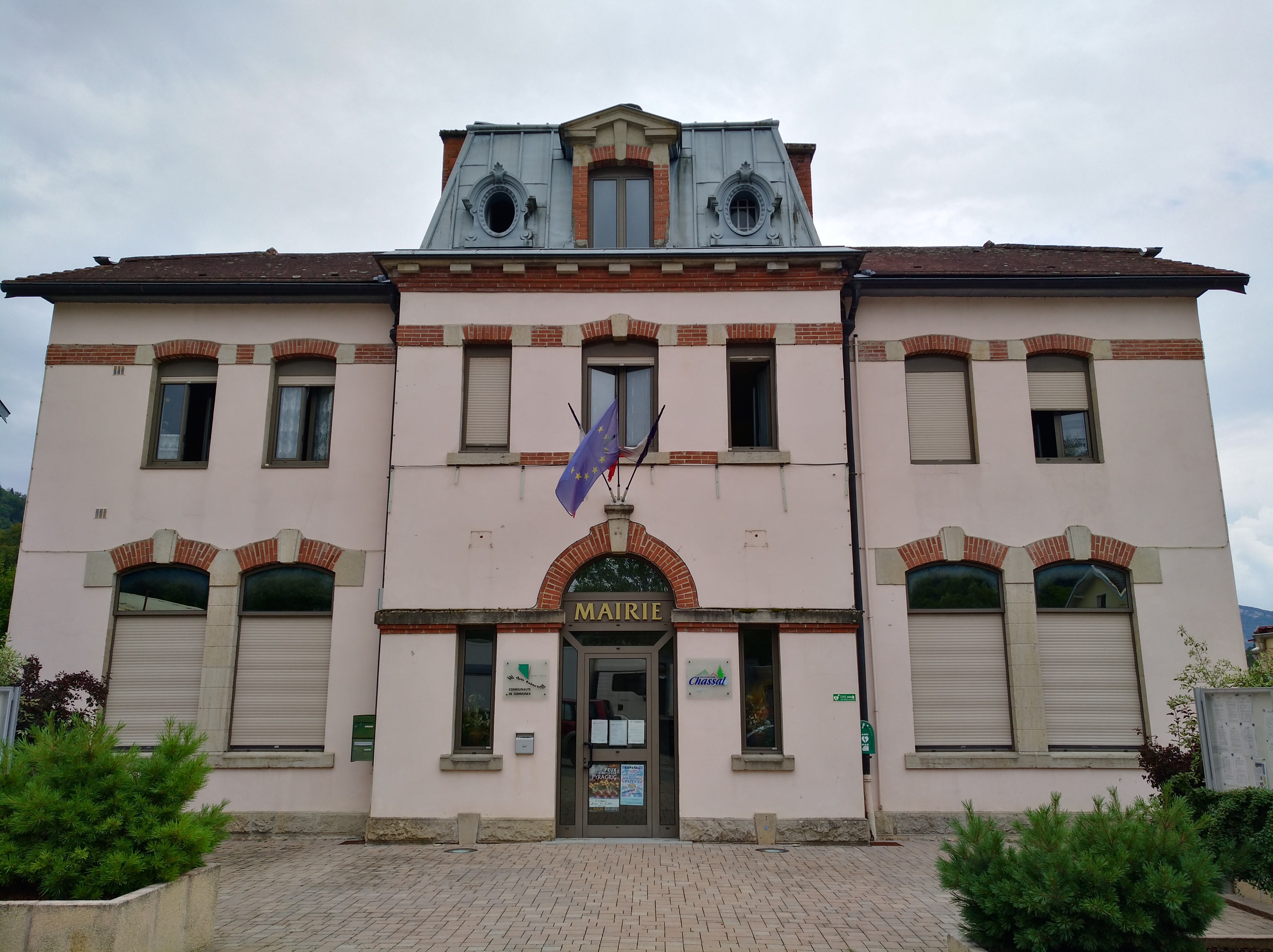 Mairie de Chassal (Jura, France).